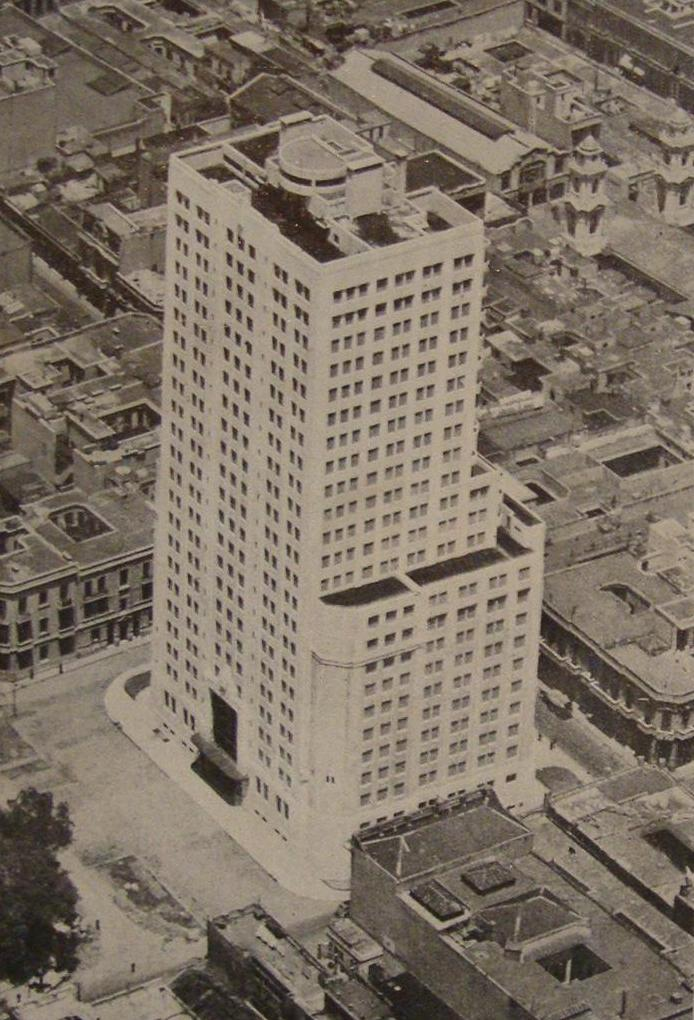 Vista aérea del edificio del Ministerio de Obras Públicas, Av. 9 de Julio y Av. Belgrano. Actualmente Ministerio de Salud y Ministerio de Desarrollo Social.